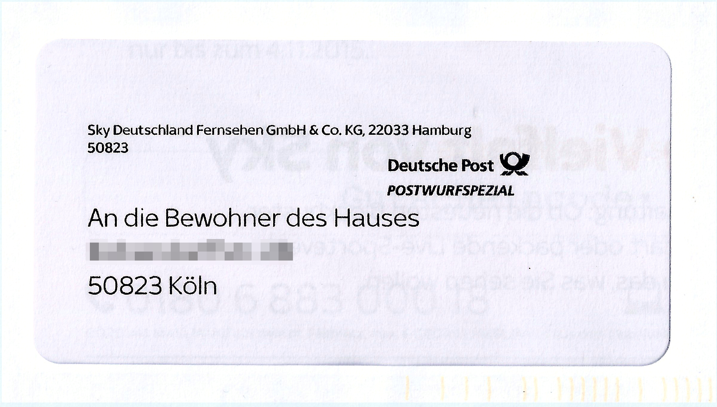 Anschriftenfeld einer Postwurfspezial-Sendung der Firma Sky Deutschland Fernsehen GmbH & Co.KG, Hamburg